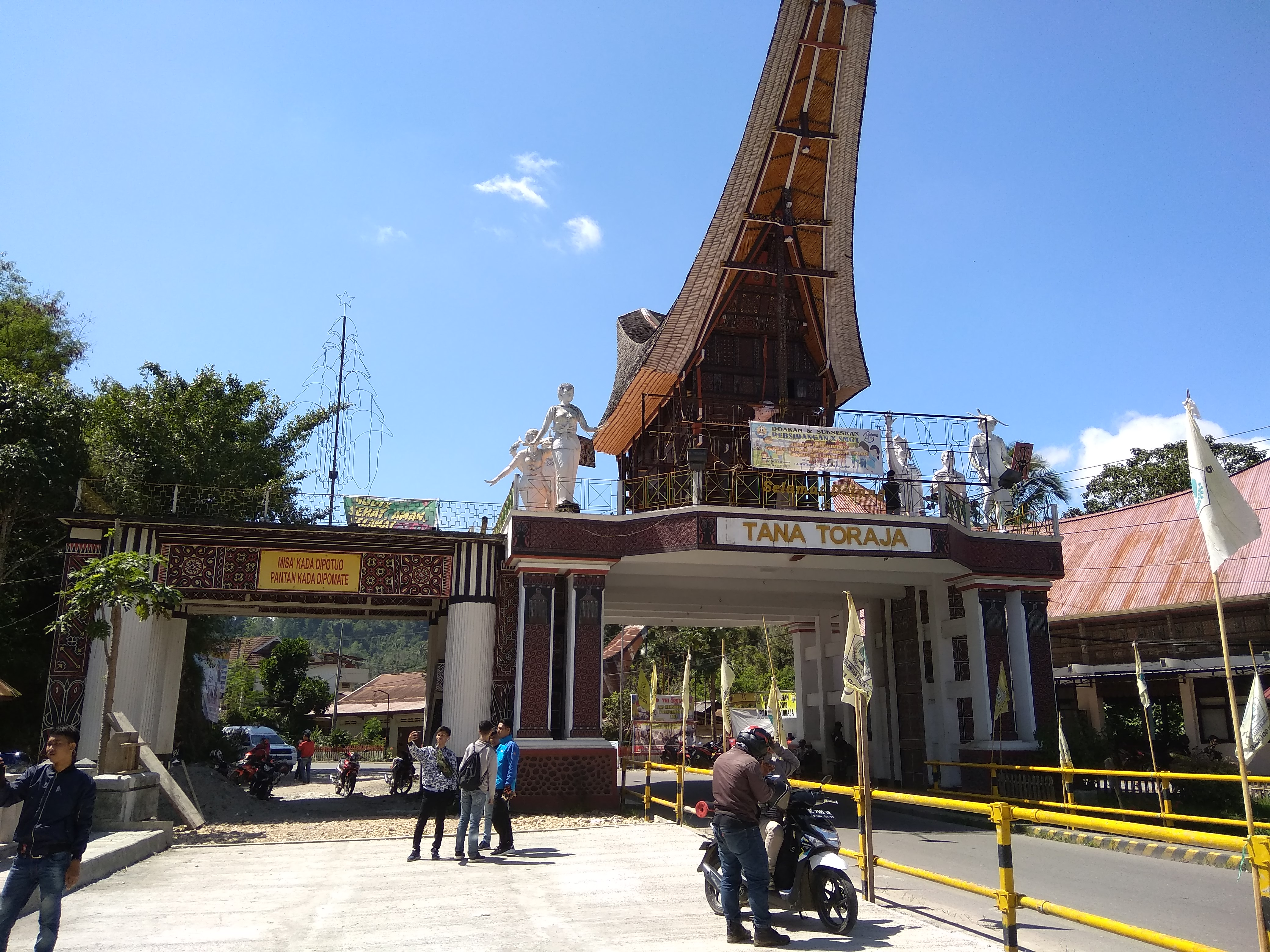 TUGU SELAMAT DATANG DI KABUPATEN TANAH TORAJA, BERUPA RUMAH ADAT TONGKONAN DAN TERDAPAT TULISAN “Misa Kada Dipotuo Pantan Kada Dipomate” yang artinya adalah “Satu Kata Kita Hidup Tapi Jika Masing-masing Berbeda Kita Akan Mati.